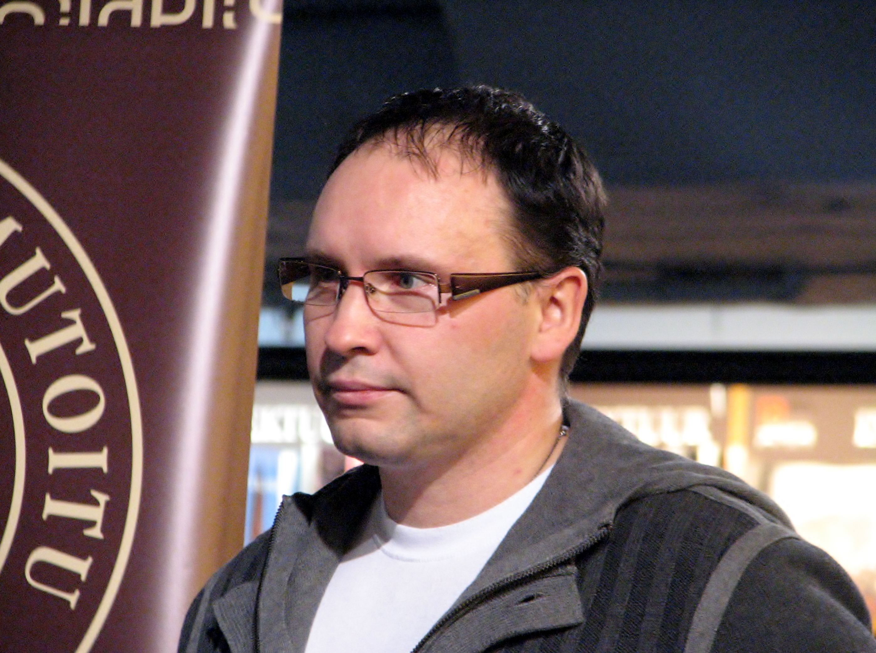 Andrei Ivanov oma raamatu "Harbini ööliblikad" esitlusel Viru keskuse Rahva Raamatus